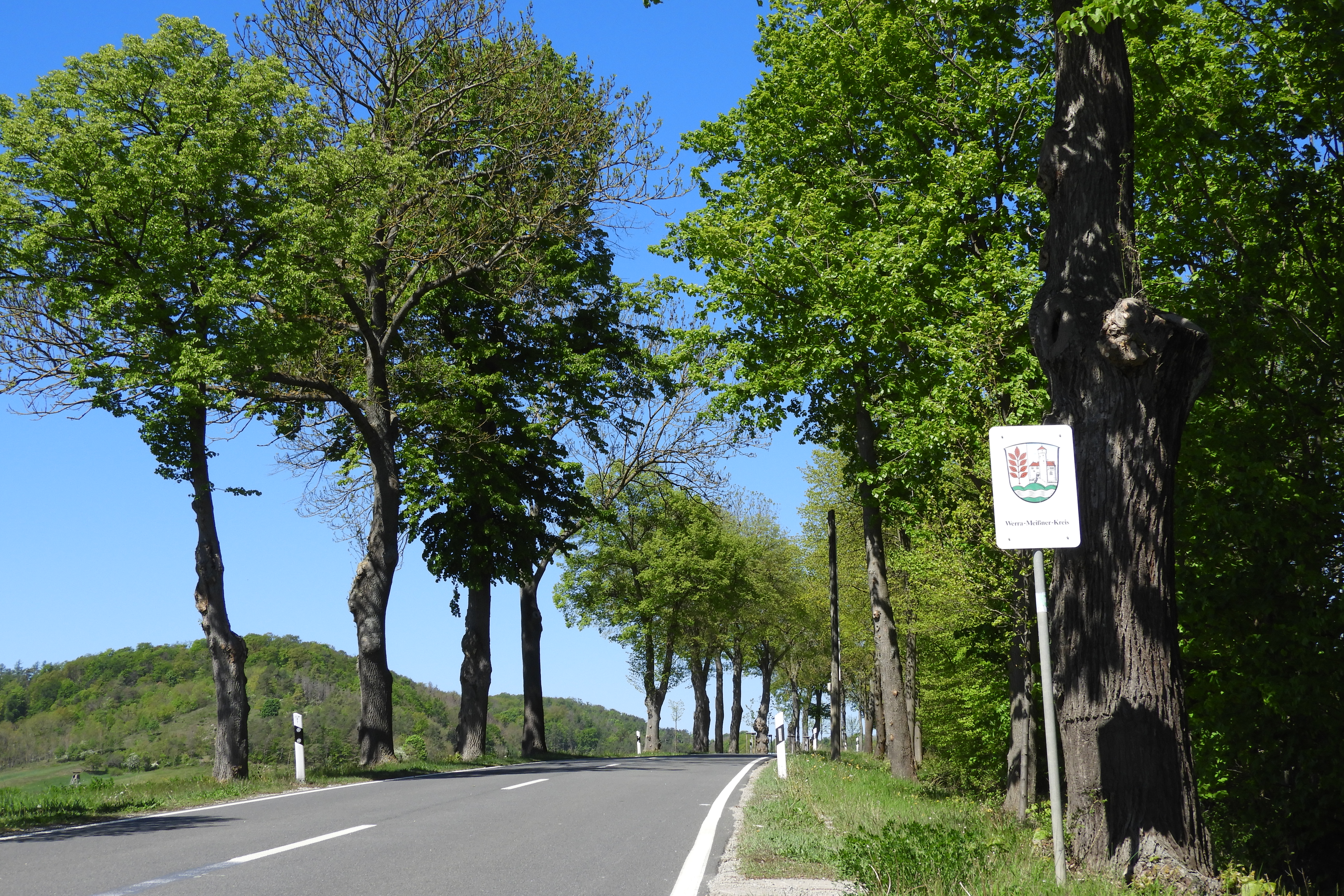 In der Zeit der deutschen Teilung endete die Bundesstraße7 als Sackgasse am Grenzzaun. Die jahrzehntelange Nutzungsruhe bewahrte die alten Bäume vermutlich vor der Abholzung. Inzwischen stehen sie unter gesetzlichem Biotopschutz. Der Bereich an der hessisch-thüringischen Landesgrenze gehört zu der Gemarkung von Lüderbach, einem Ortsteil der Gemeinde Ringgau im nordhessischen Werra-Meißner-Kreis. Östlich davon liegt Ifta, ein Stadtteil von Treffurt im westthüringischen Wartburgkreis.